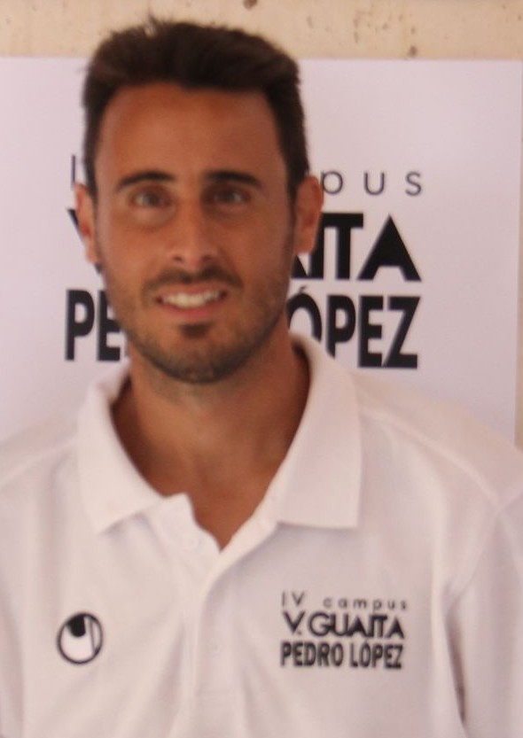 Pedro López a un acte a Torrent.